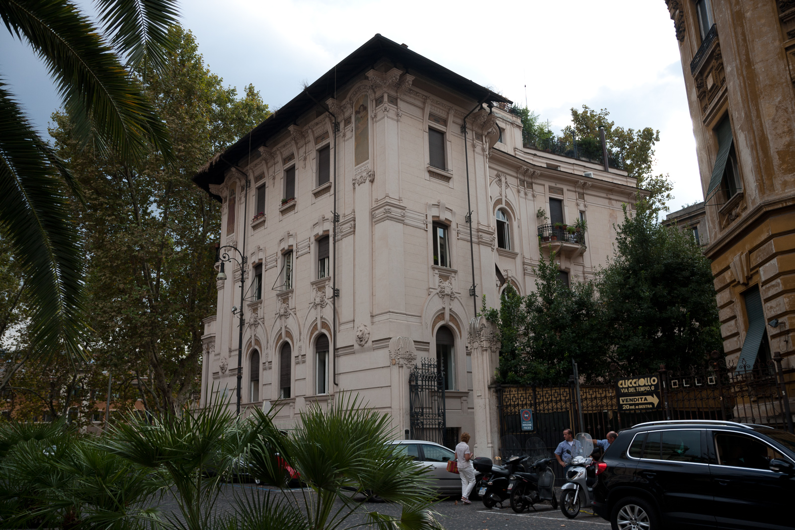 Rione XI Sant'Angelo, 00186 Roma, Italy